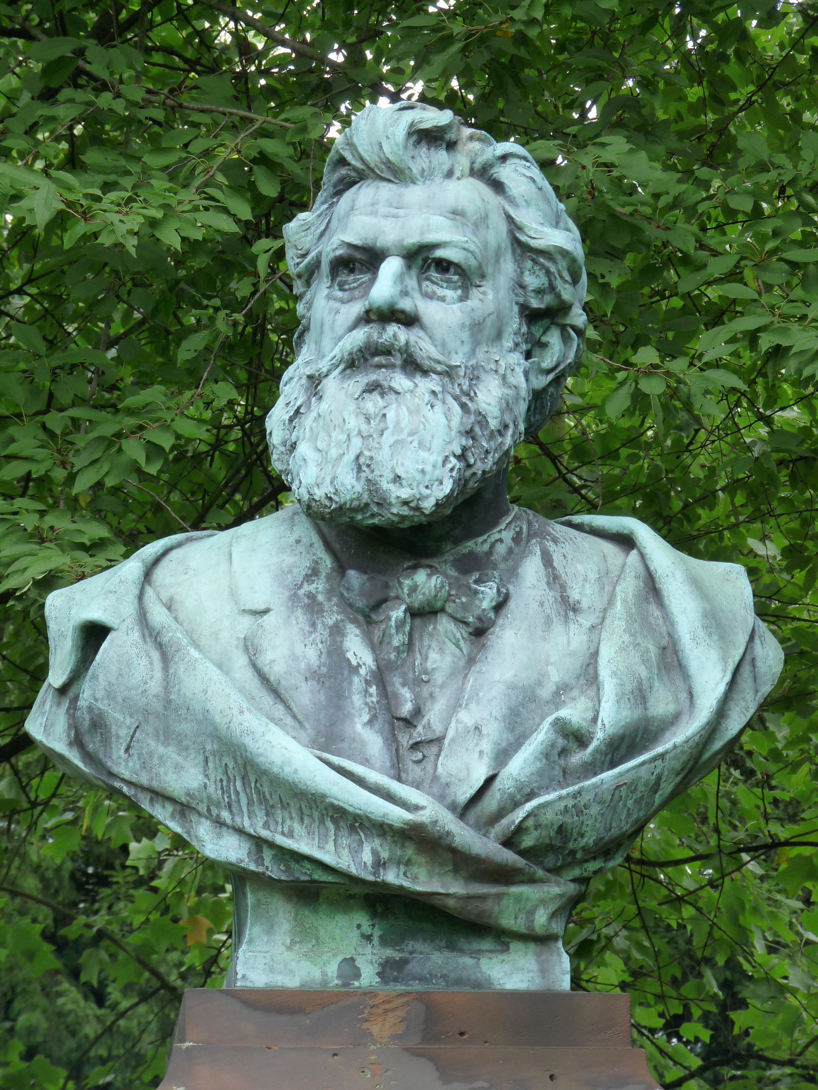 Monument Victor Nessler (Alfred Marzolff) au parc de l'Orangerie à Strasbourg